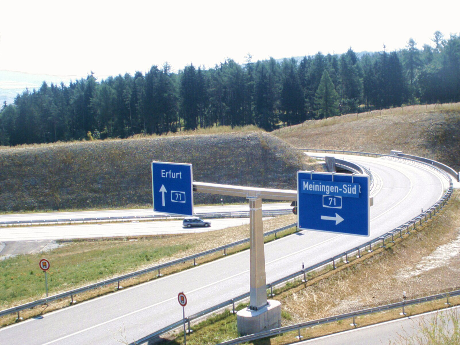 Autobahnanschlussstelle Meiningen-Nord der A71